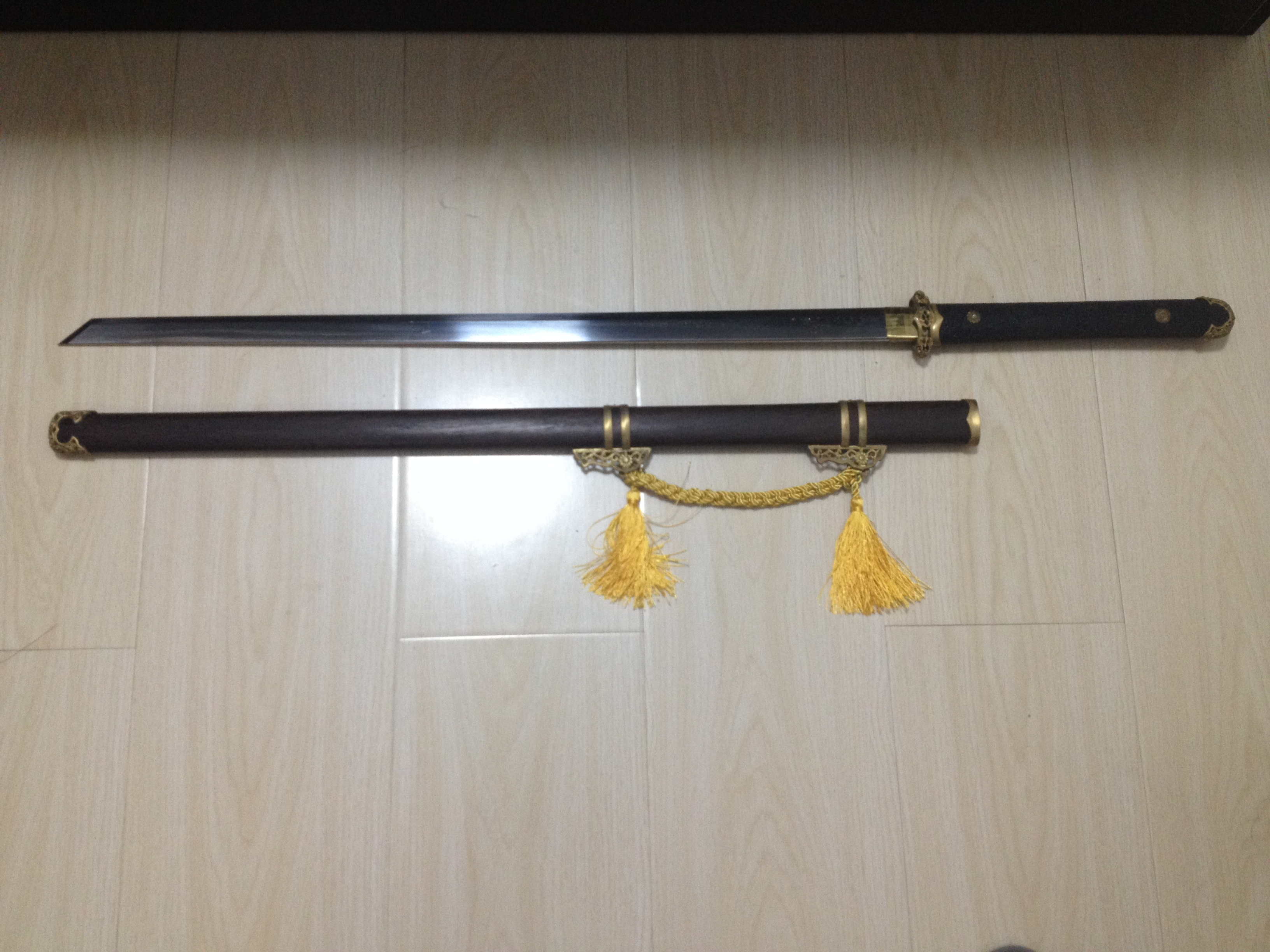 藏品：唐刀